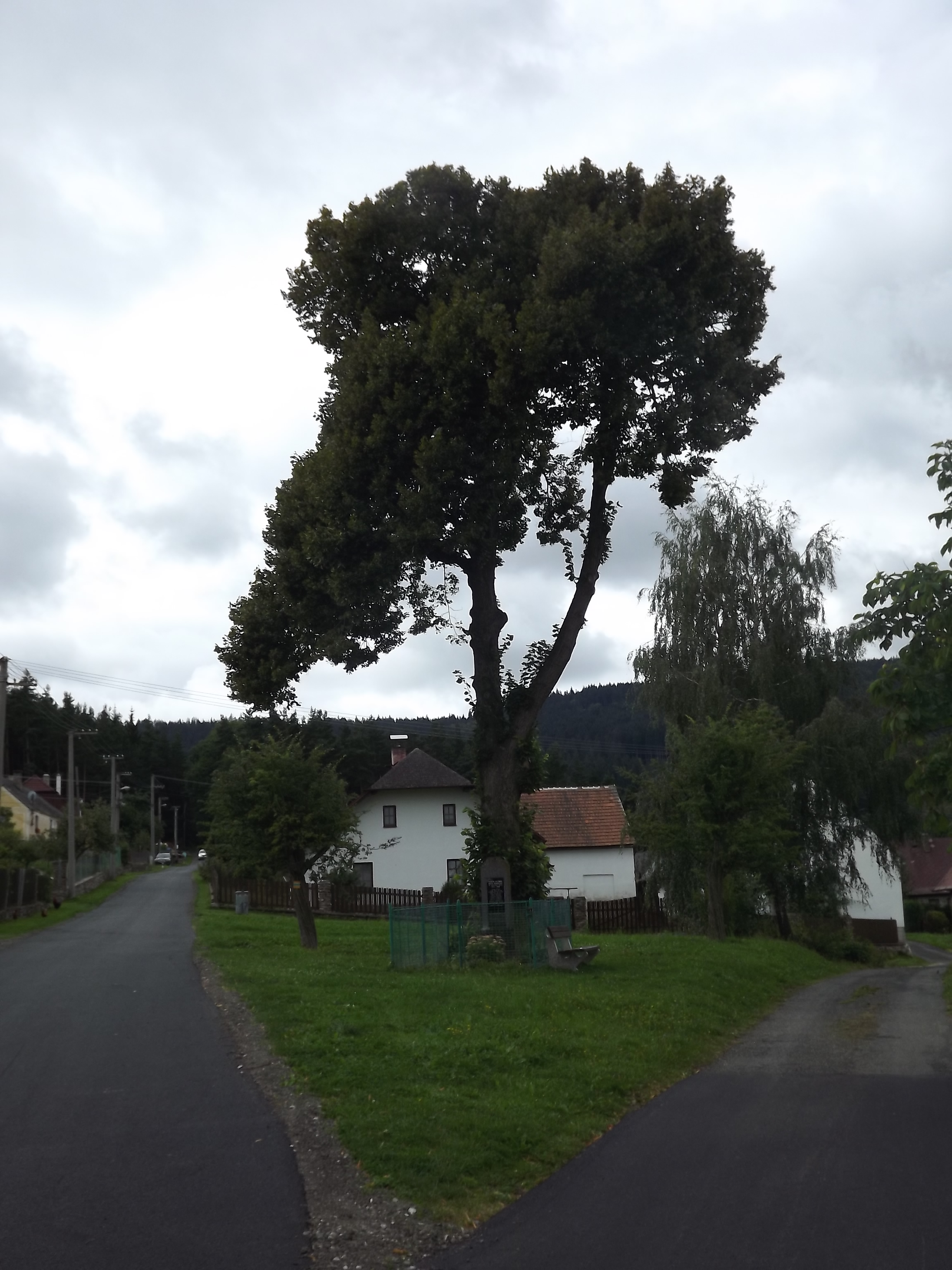 Pohorsko